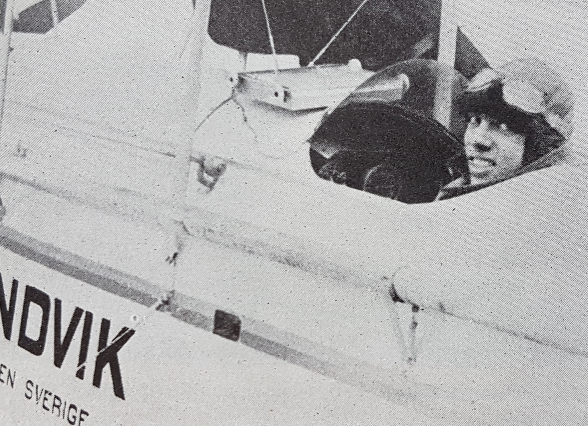 Gösta Andree startklar i Sandvik flygplan inför afrikaflygningen